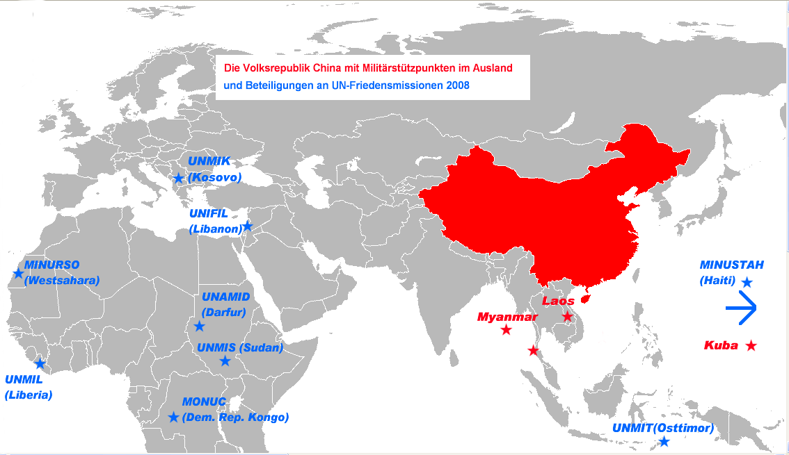 Kartendarstellung der Volksrepublik China mit den Militärstützpunkten im Ausland (einschl. SIGINT-Stationen) und Beteiligungen an Friedensmissionen der Vereinten Nationen im Jahr 2008.